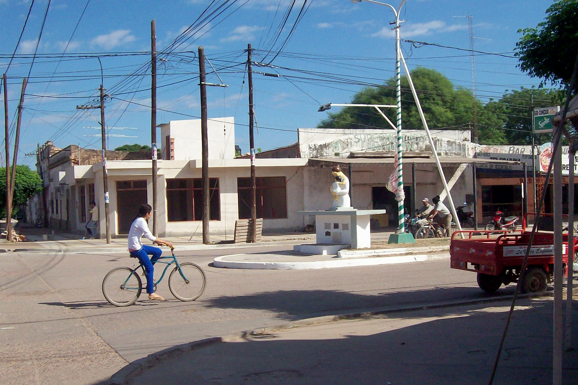 Localidad de Tintina, Departamento Moreno, Provincia de Santiago del Estero, República Argentina.